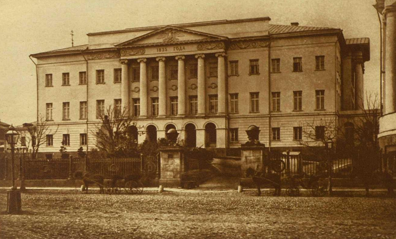 "Новое" здание Московского университета, 1912 год.